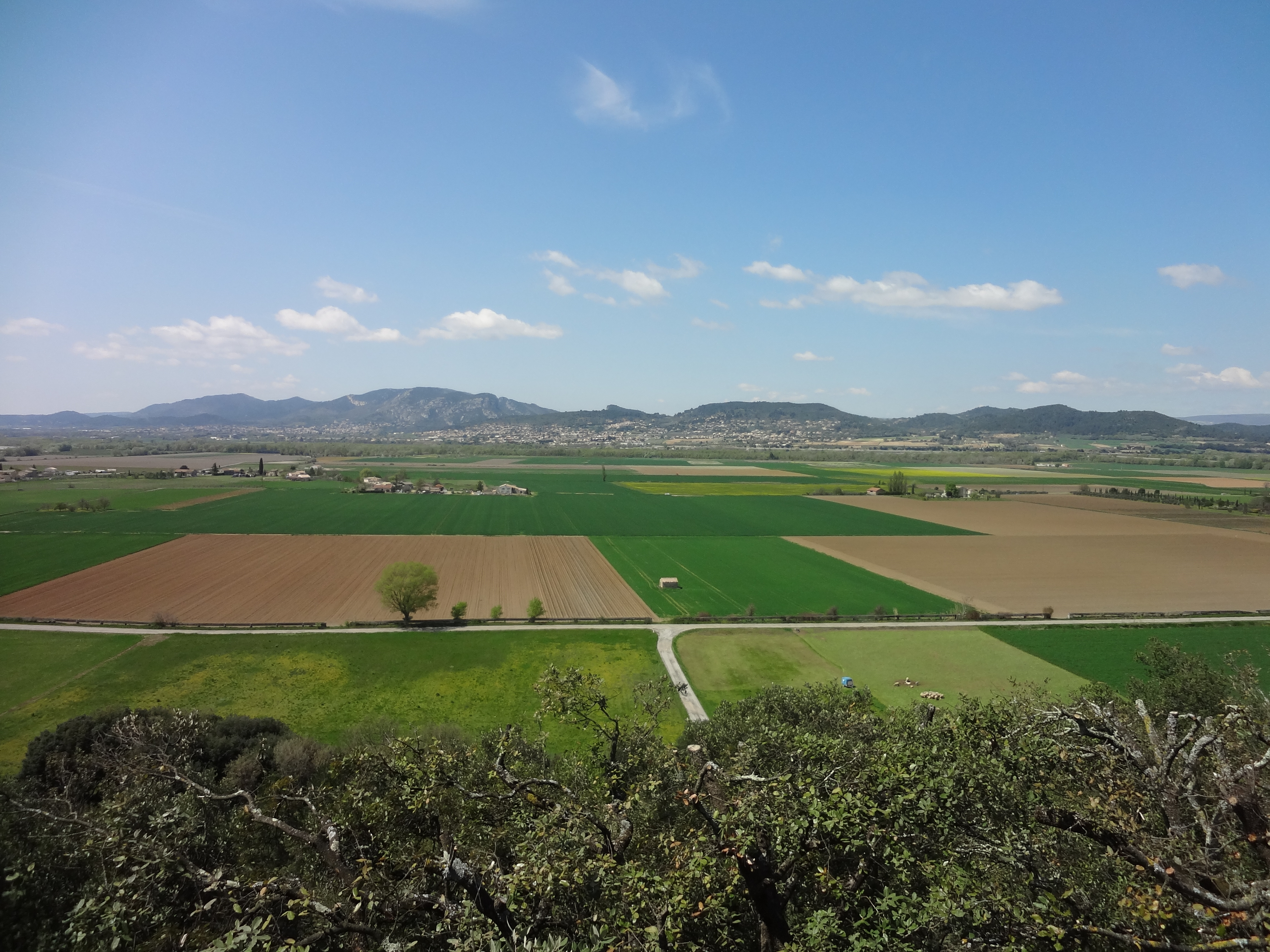 champs à Oraison (Alpes-de-Haute-Provence), vus de la chapelle Saint-Pancrace